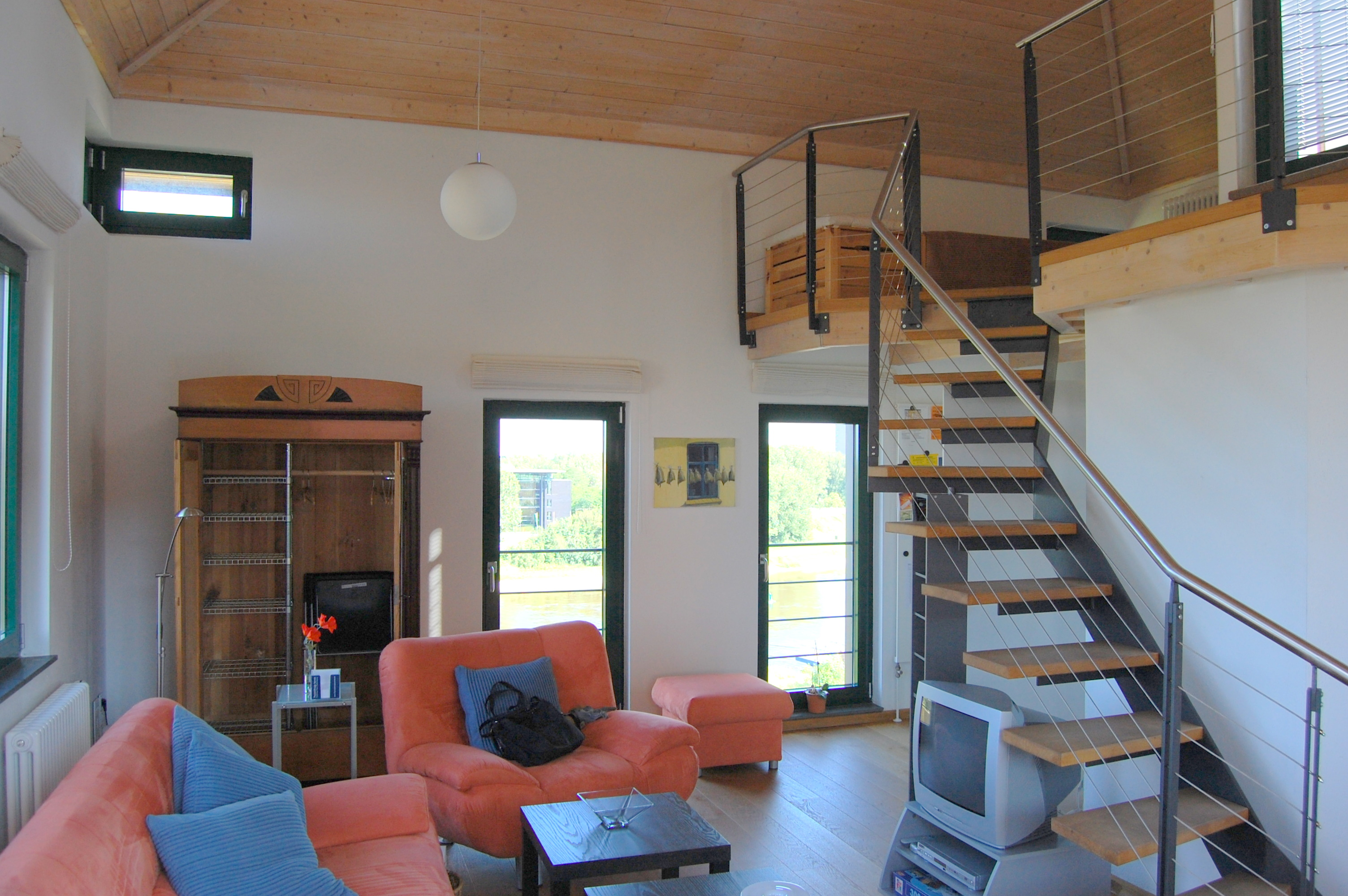 Ferienwohnung im obersten Geschoss des Turms hinter der Ausfahrt der Möllenvogtei in Magdeburg